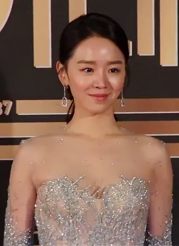 2017년 마지막 날인 12월 31일 오후 서울 영등포 여의도 KBS홀 야외광장에서 '2017 KBS 연기대상' 레드카펫 행사가 열렸다.